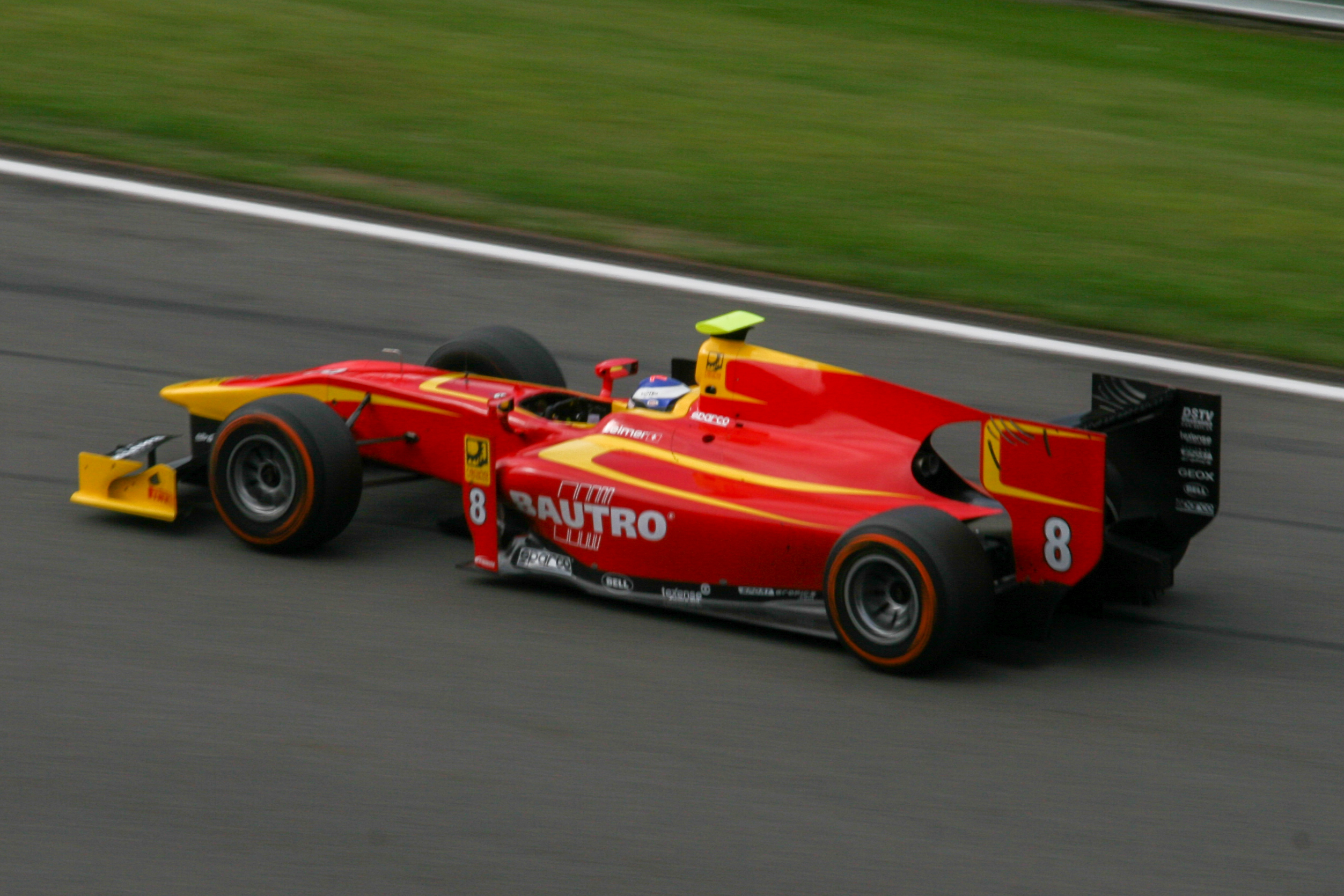 Fabio Leimer beim Sprintrennen der GP2-Serie in Spa-Francorchamps 2013